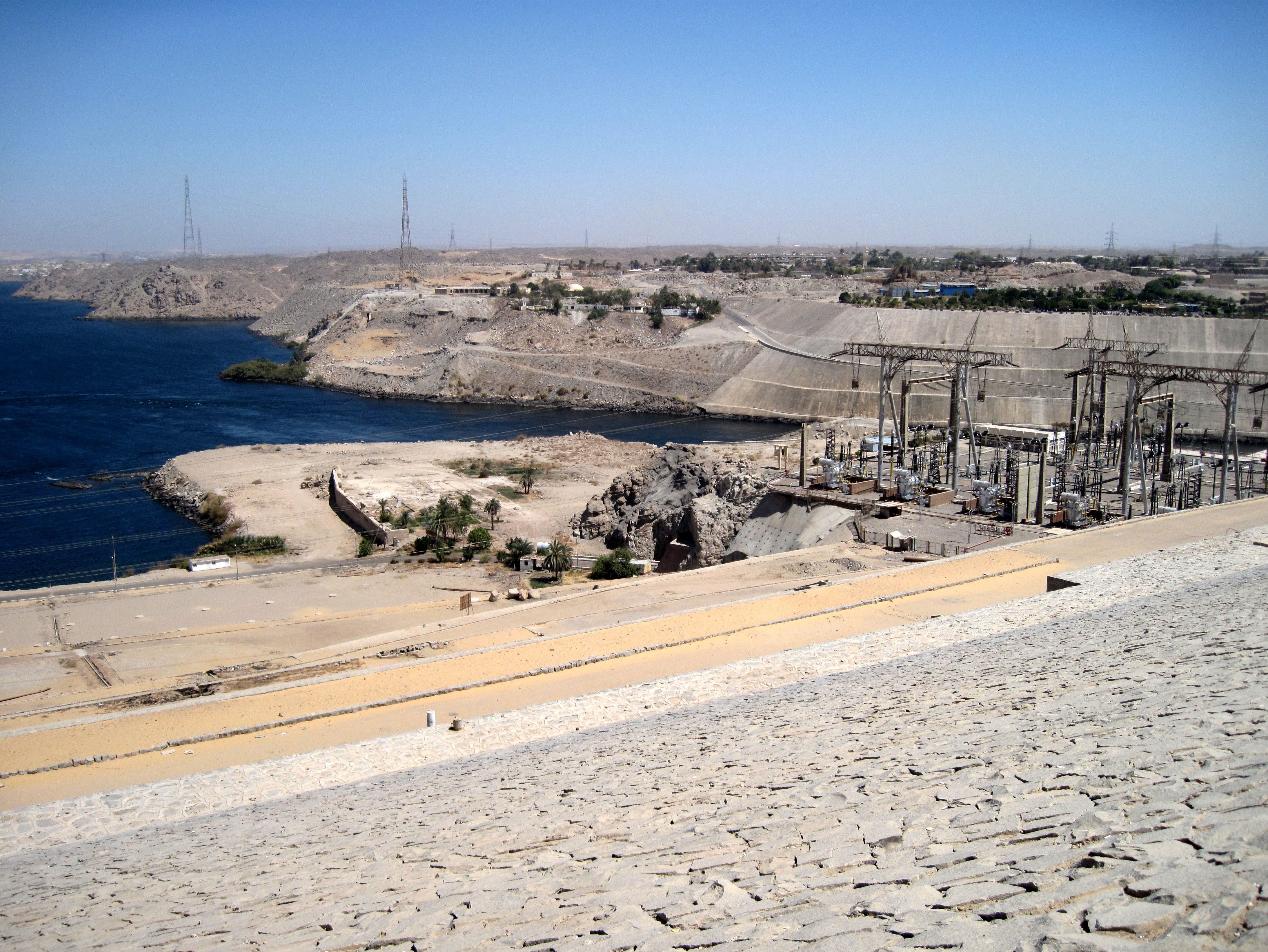 Assuan-Hochdamm, Nordostseite, Ägypten